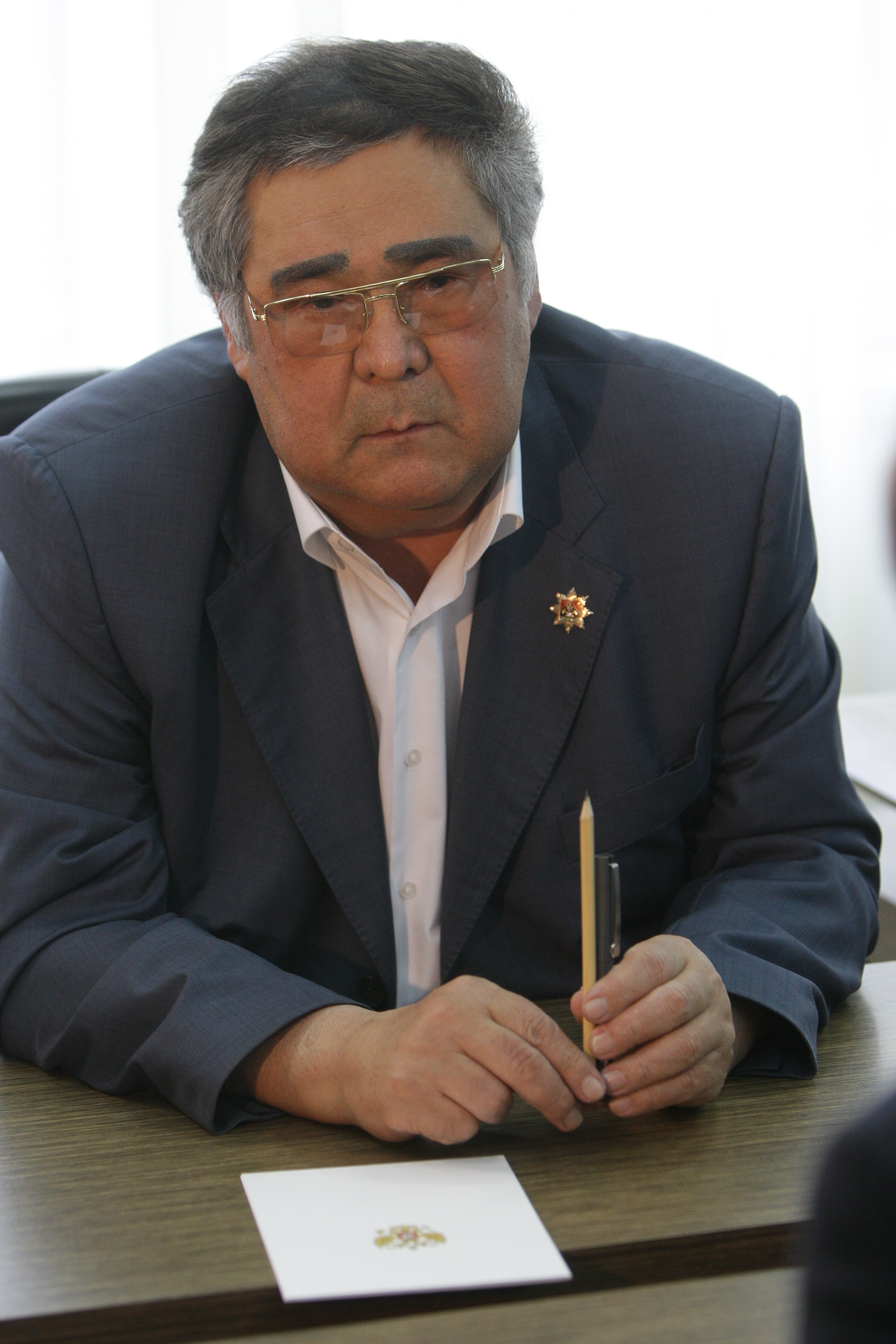 Губернатор Кемеровской области А. Г. Тулеев на встрече с Председателем Правительства Российской Федерации В. В. Путиным